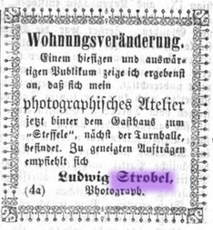 Umzugsanzeige des Fotografen Ludwig Strobel